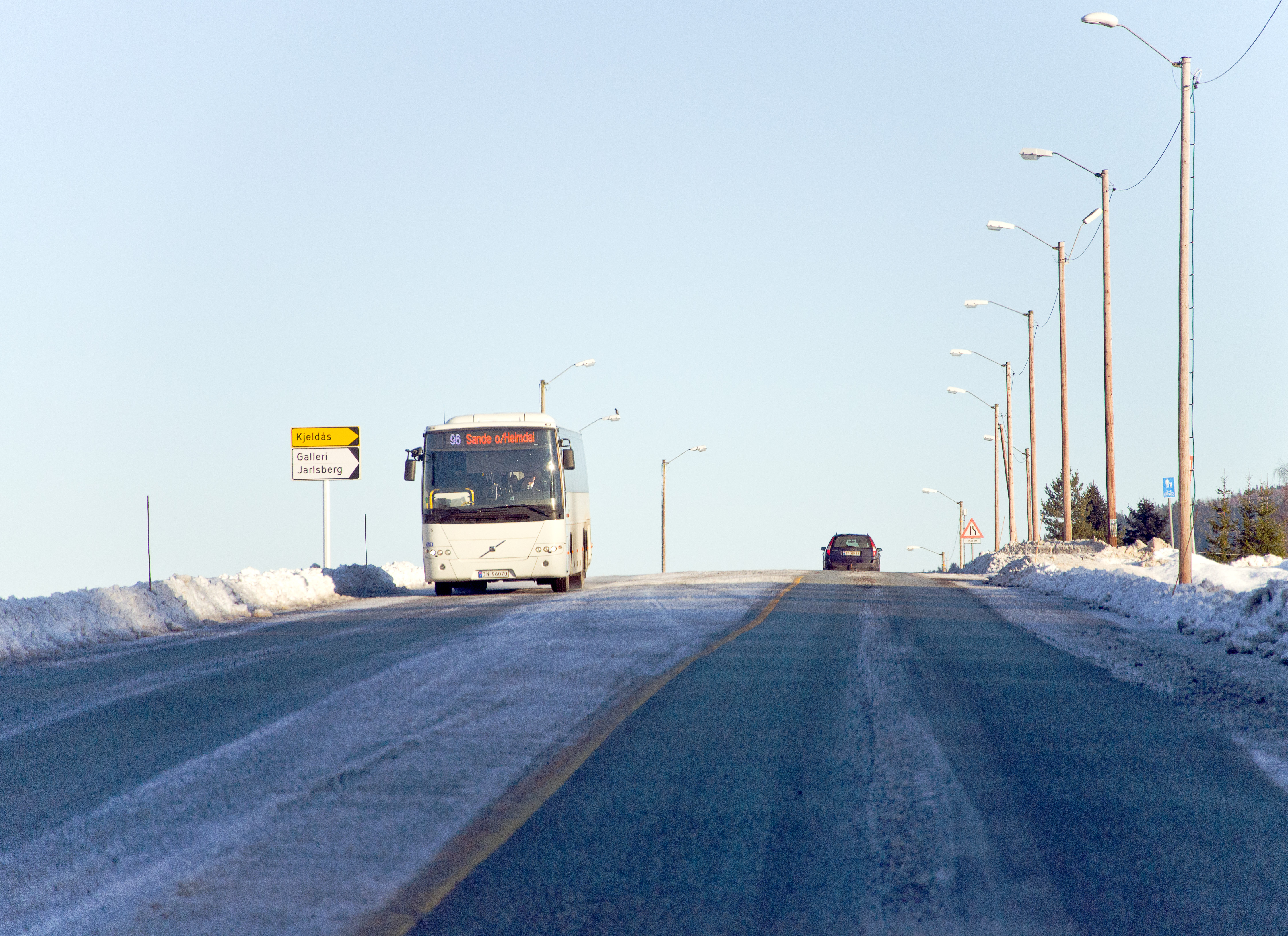 Fylkesvei 958 Gamle Sørlandske i Vestfold